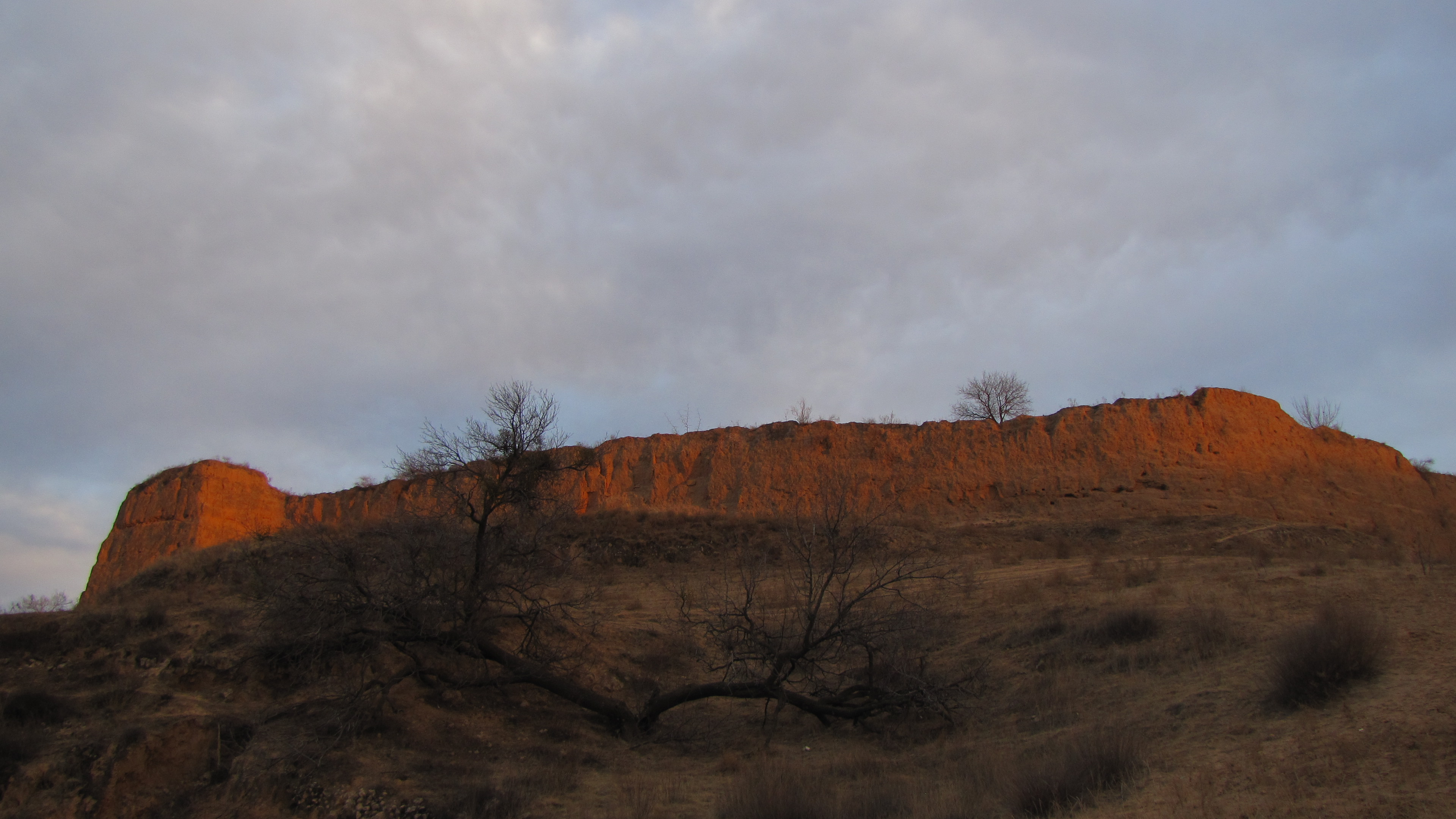 双山堡---榆林境内长城沿线36城堡之一